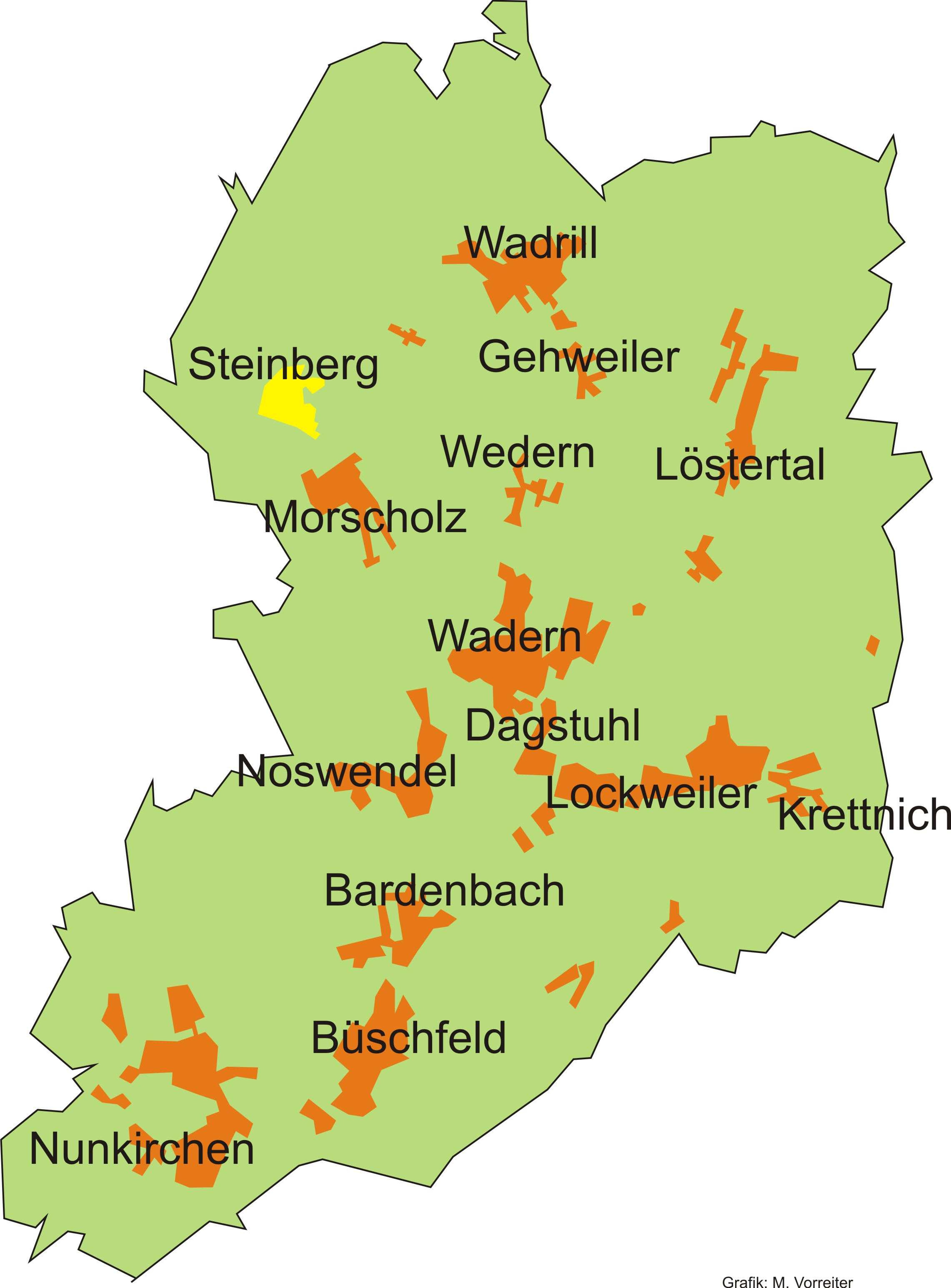 Lage des Stadtteils Steinberg im Stadtgebiet